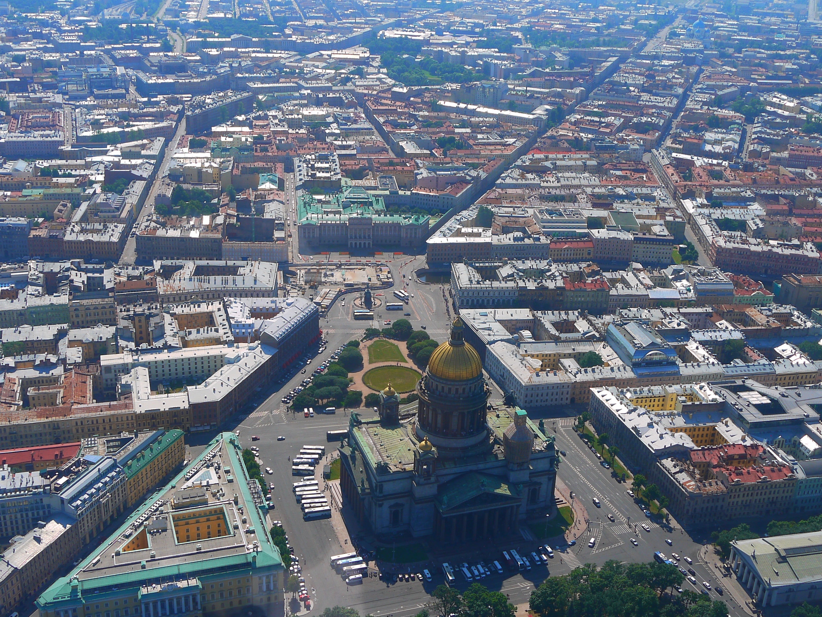 Исаакиевский собор: Исаакиевская площадь, 1 (4), Адмиралтейский район, Санкт-Петербург